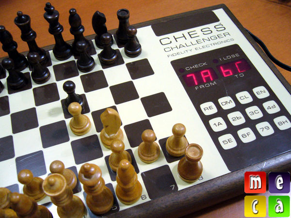 Fidelity Chess Challenguer 1, la primera computadora dedicada comercial de ajedrez, año 1977